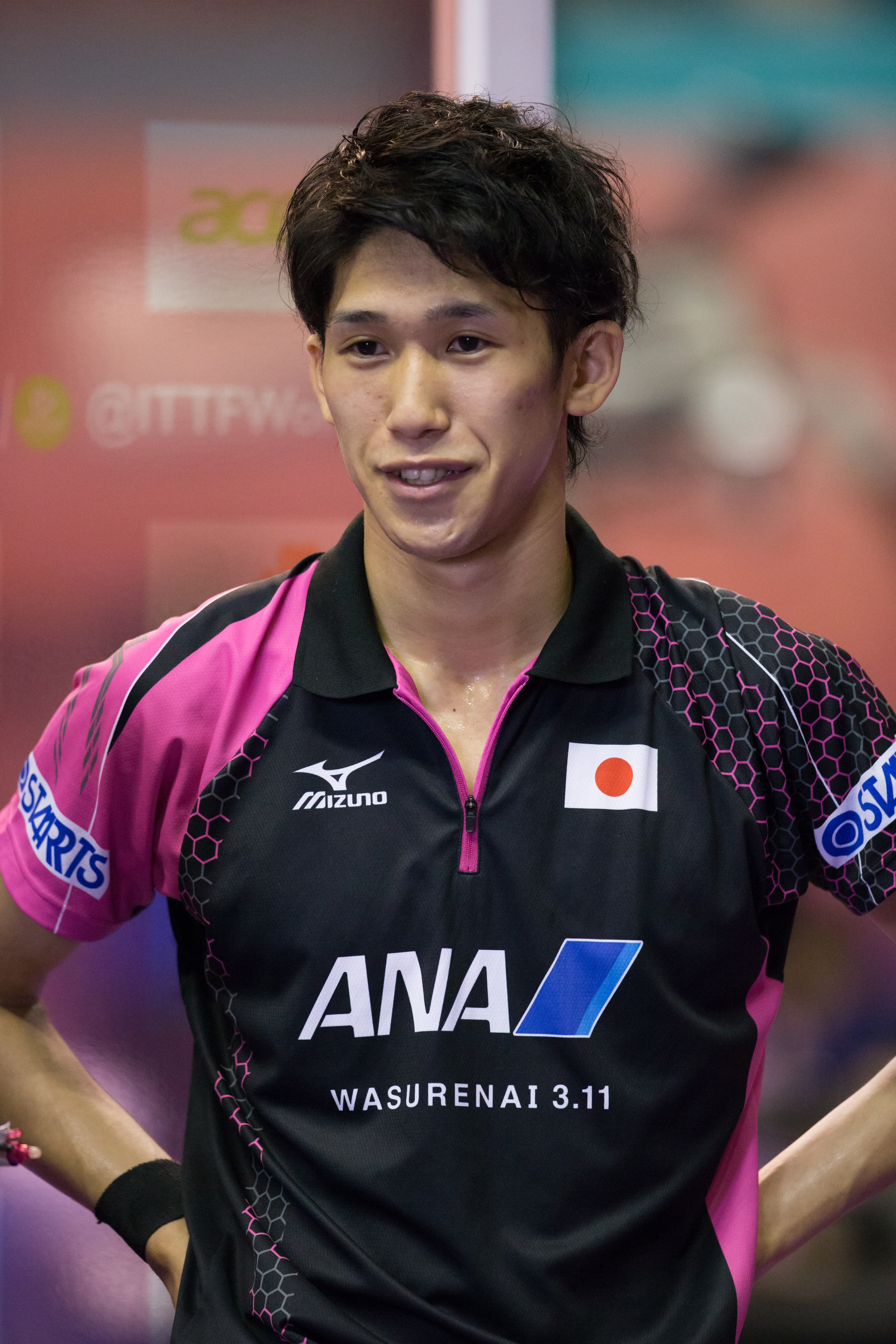 _K0K5806